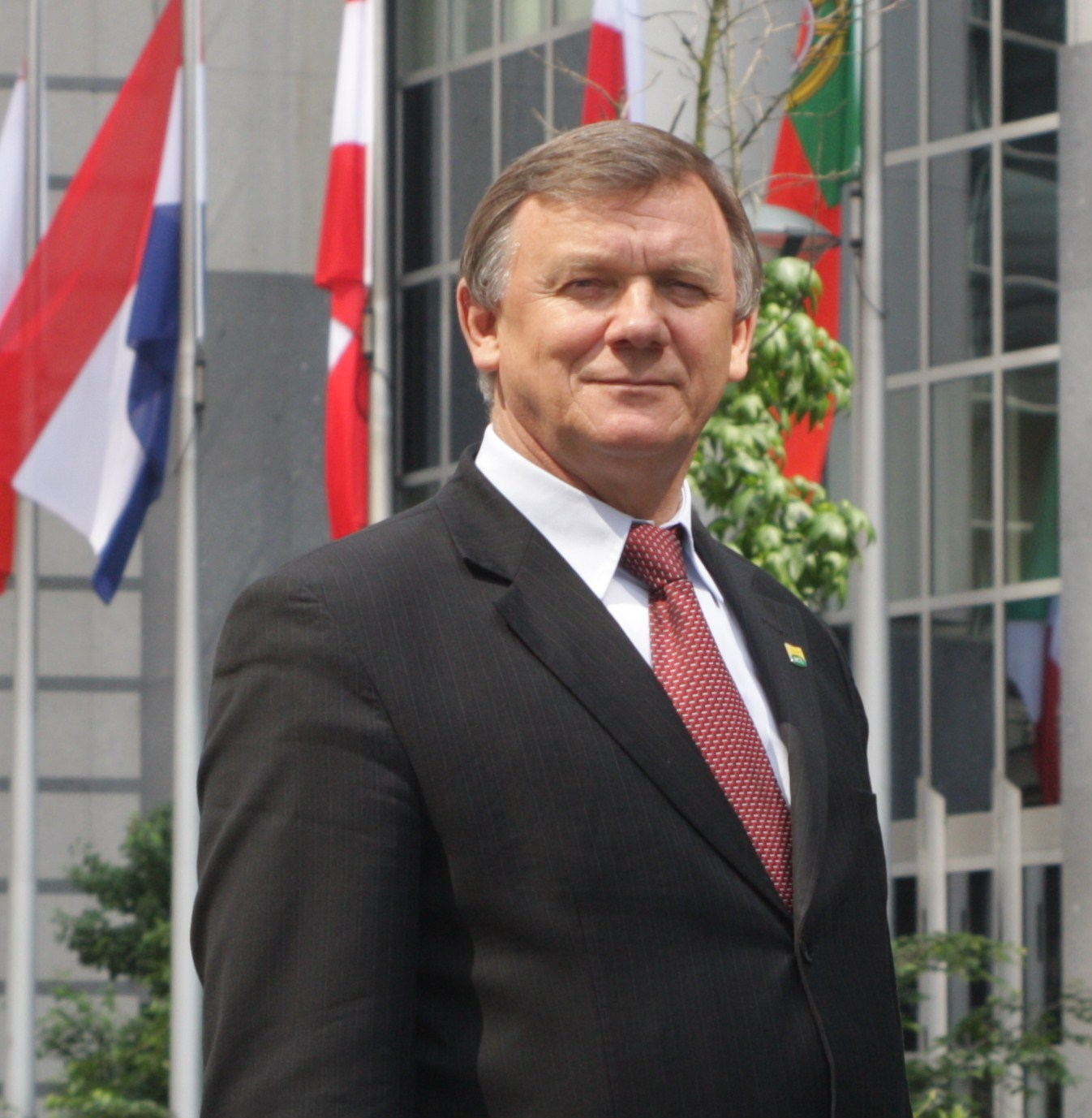 Władysław Serafin w Brukseli